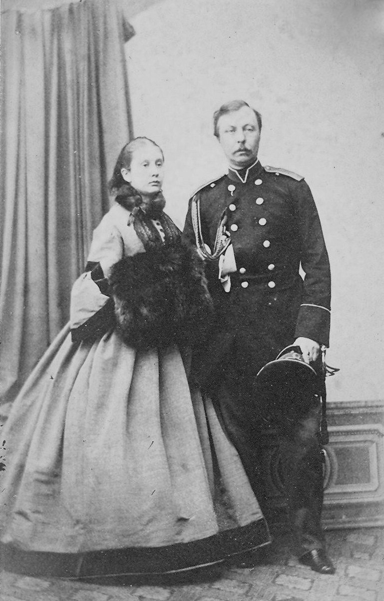 Князь Виктор Васильевич Волконский с женой Марией Александровной Стенбок-Фермор.